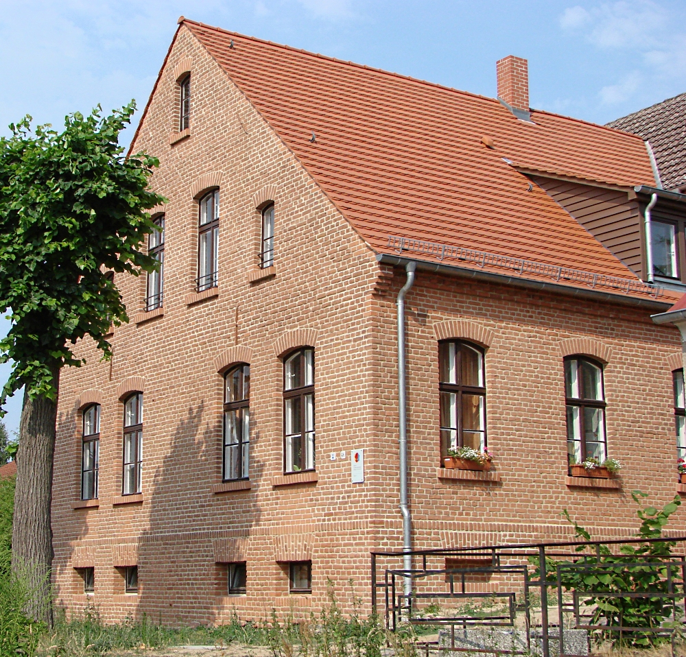 Baudenkmal; vorderer Teil der Alten Schule nach der Fassadensanierung 2010